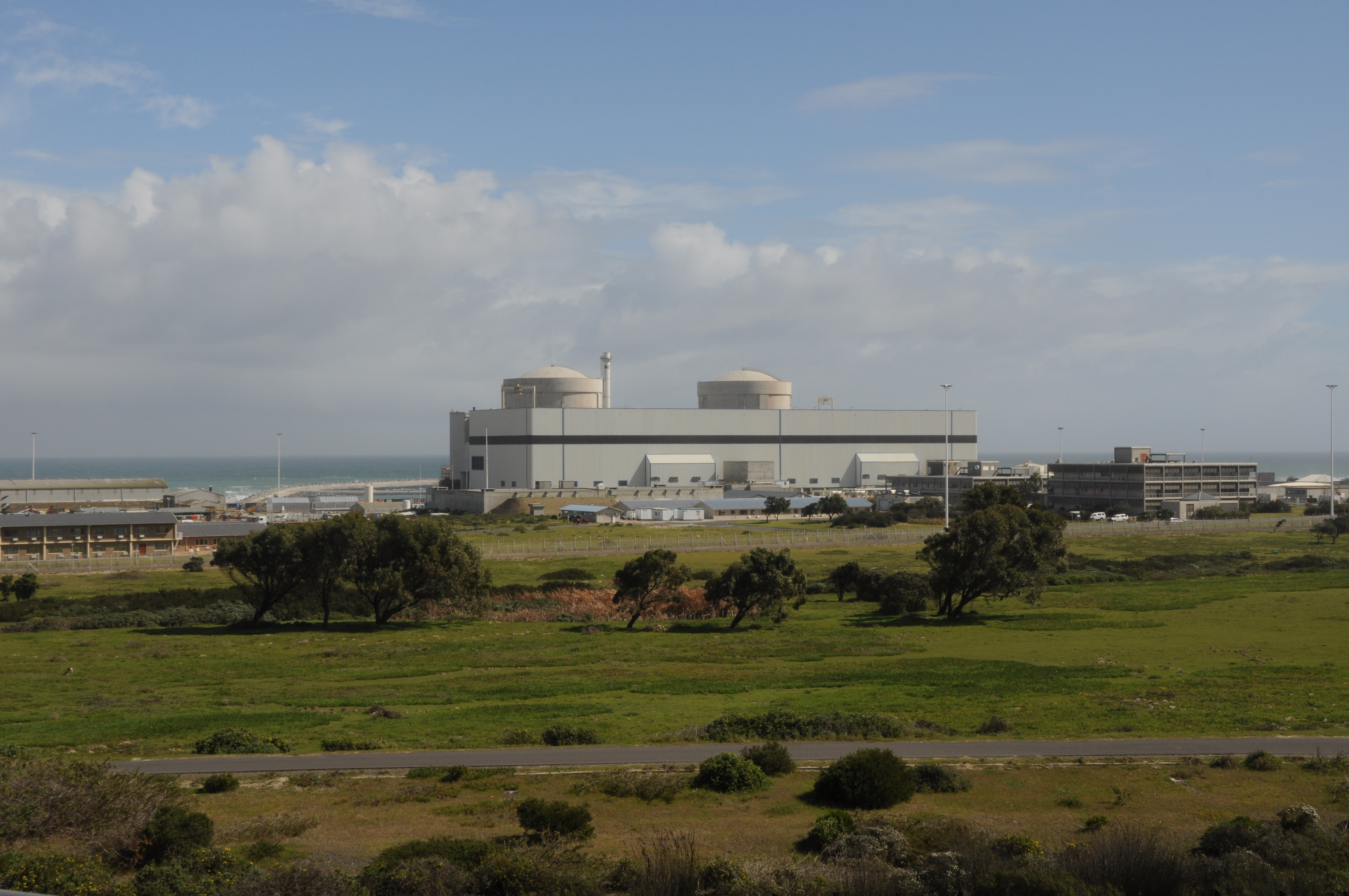 koeberg wide